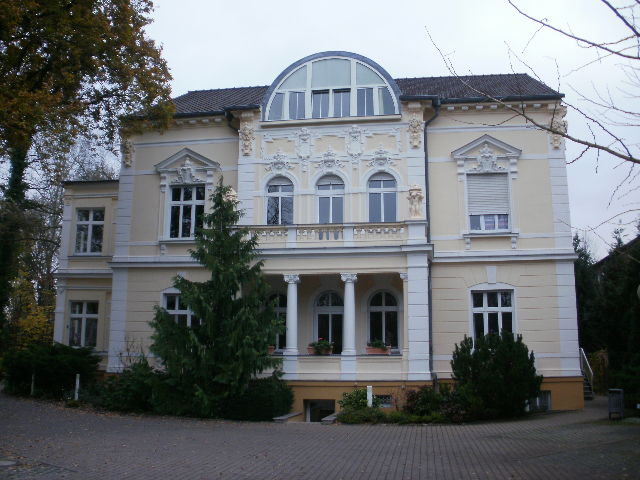 Fabrikantenvilla Ostrower Damm 1, Cottbus